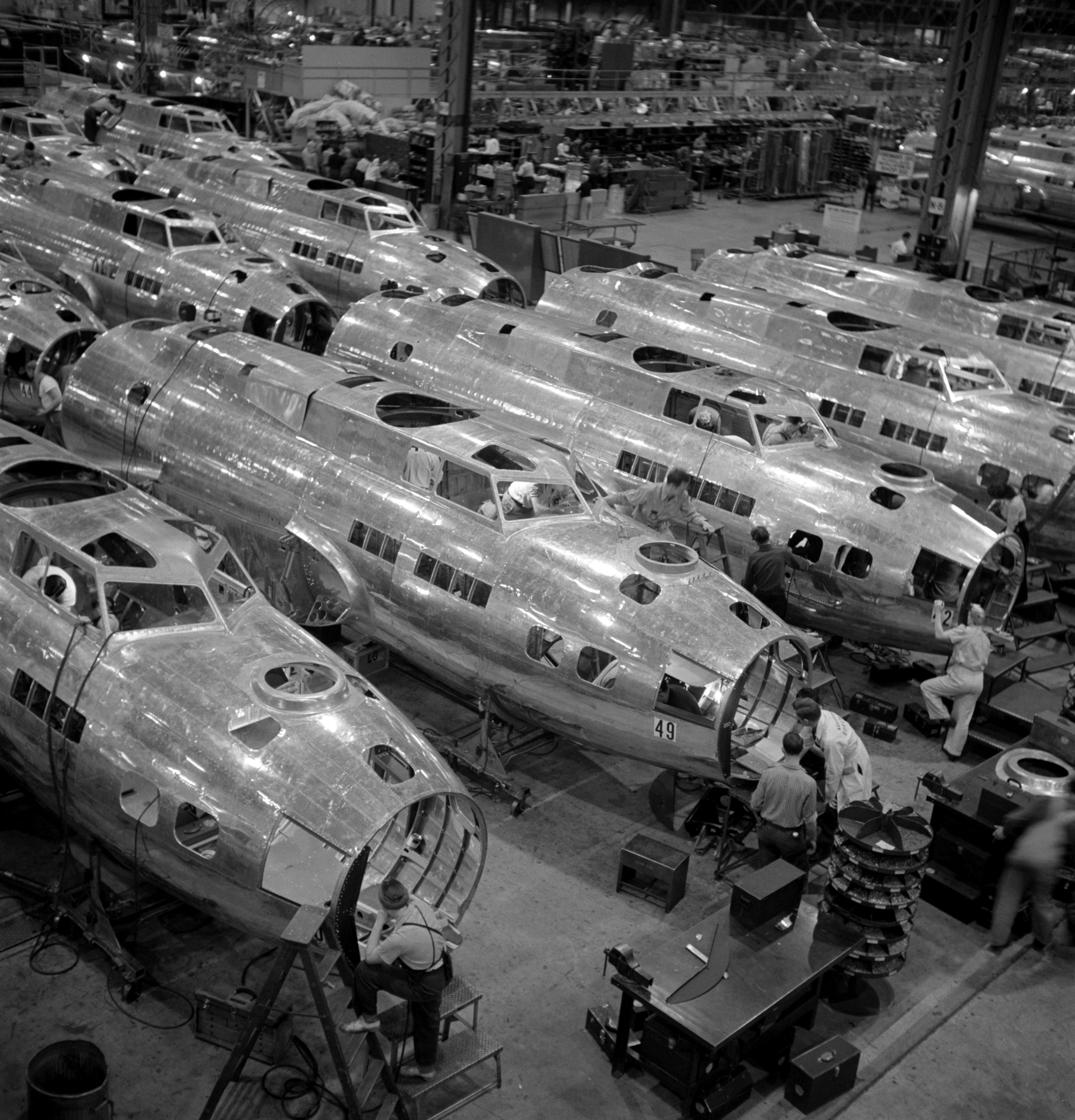 B-17 production line